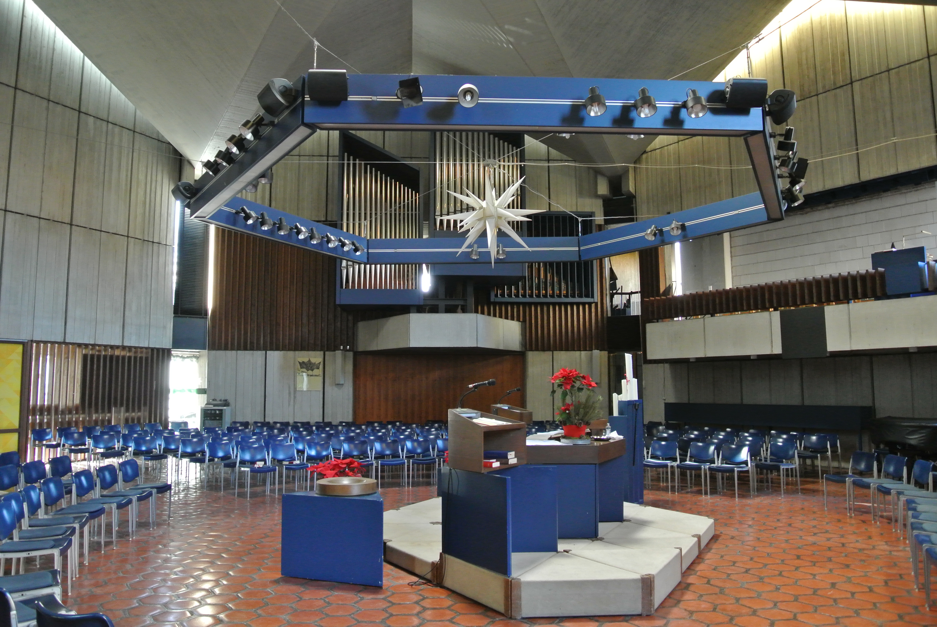 Neue Bethlehemkirche in Frankfurt-Ginnheim von Klaus-Peter Heinrici aus dem Jahr 1971, Innenraum